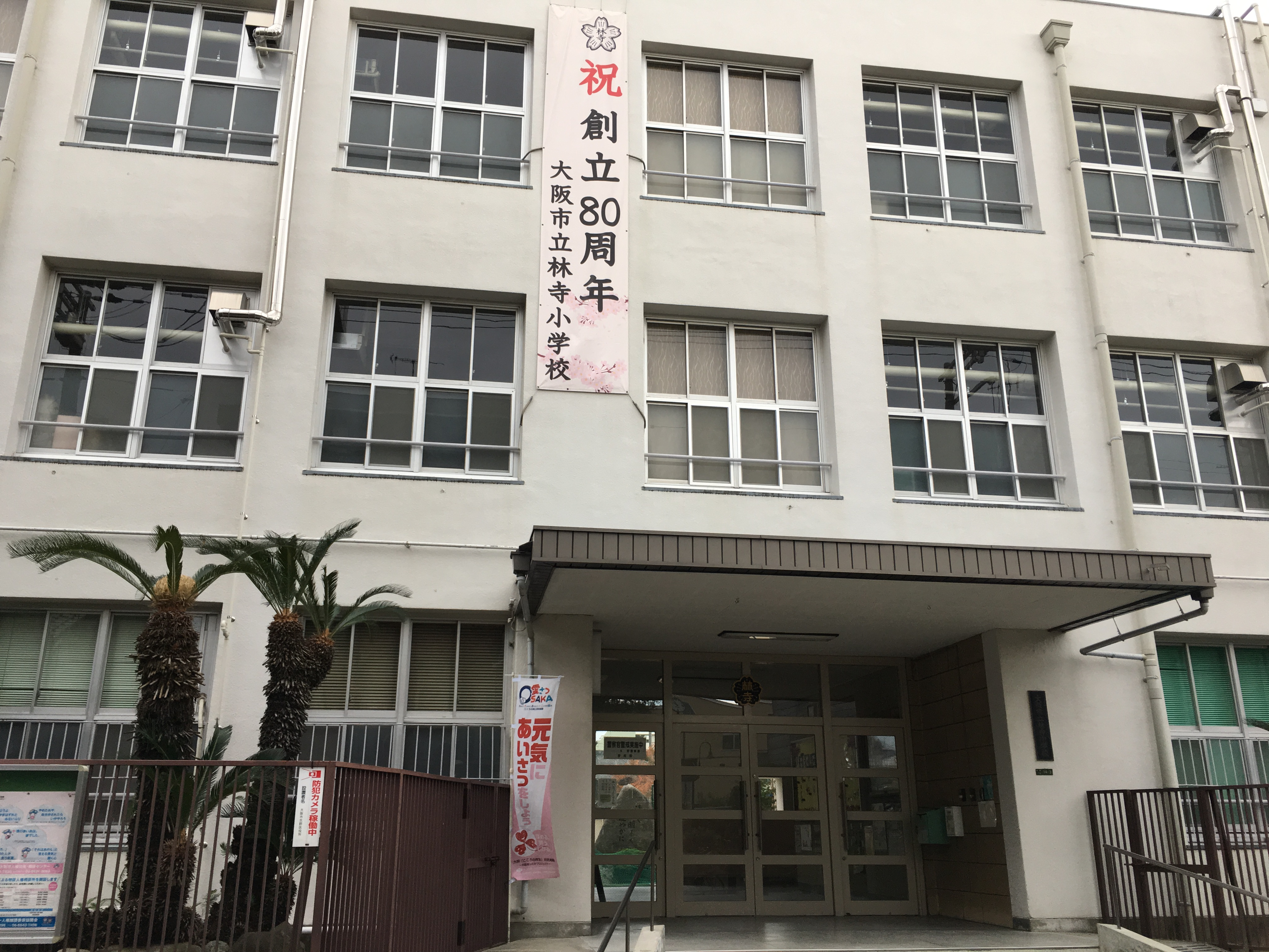 林寺小学校